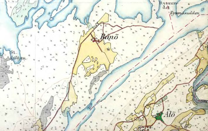 Rånö herrgård och Ålö